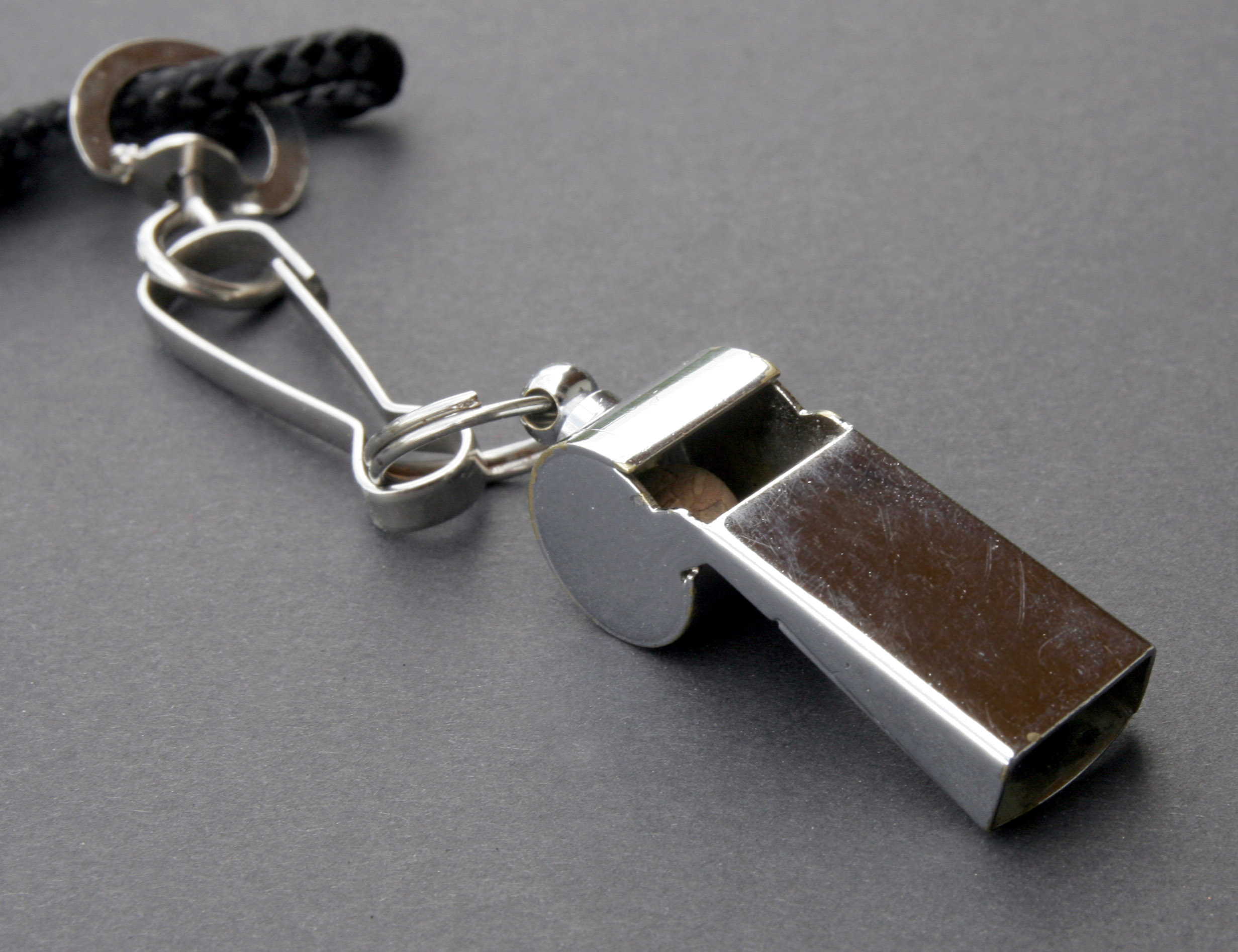 Eine Schiedsrichterpfeife